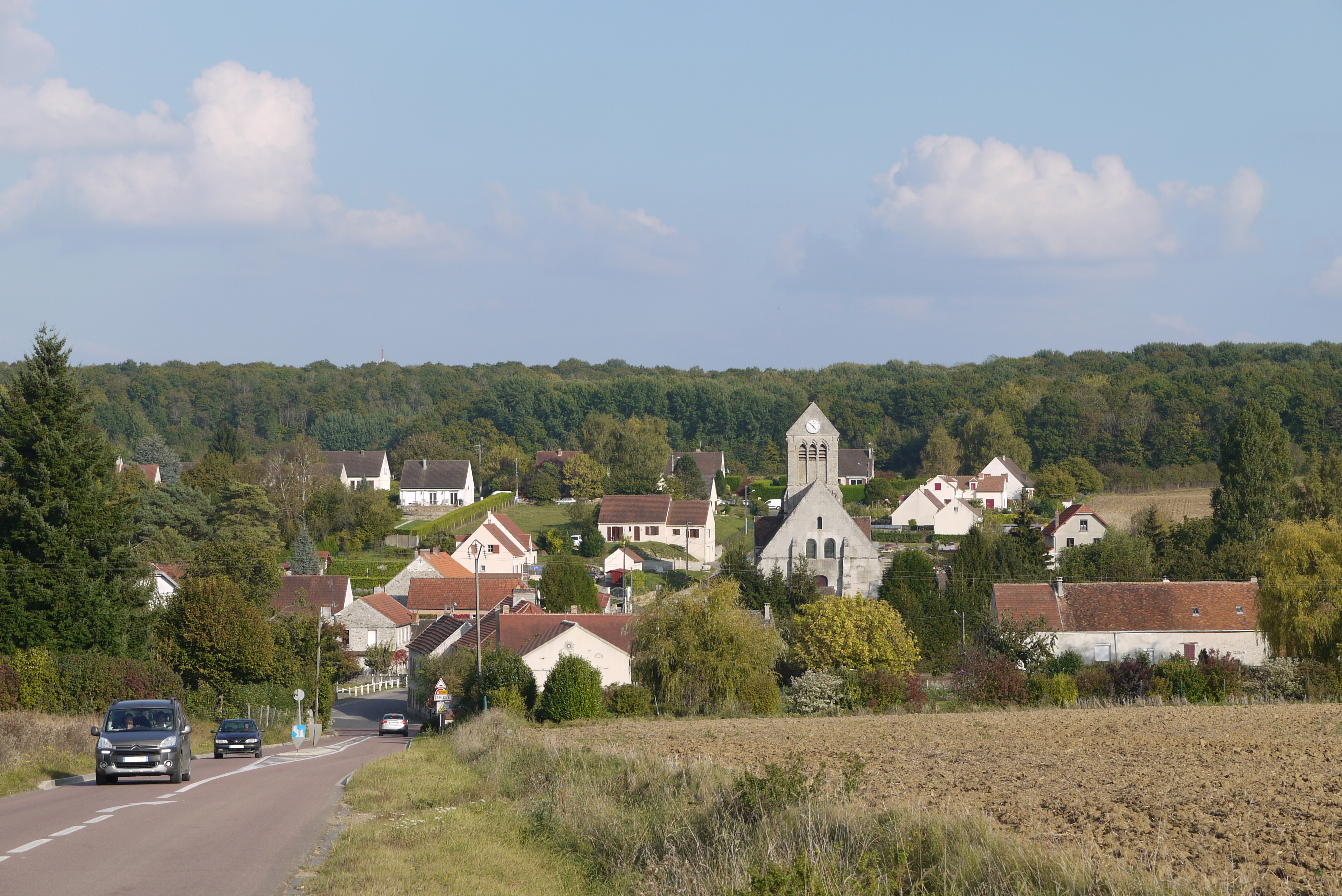 Vue du village depuis la route de Bézu.